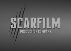 Logo de la maison de production Scarfilm